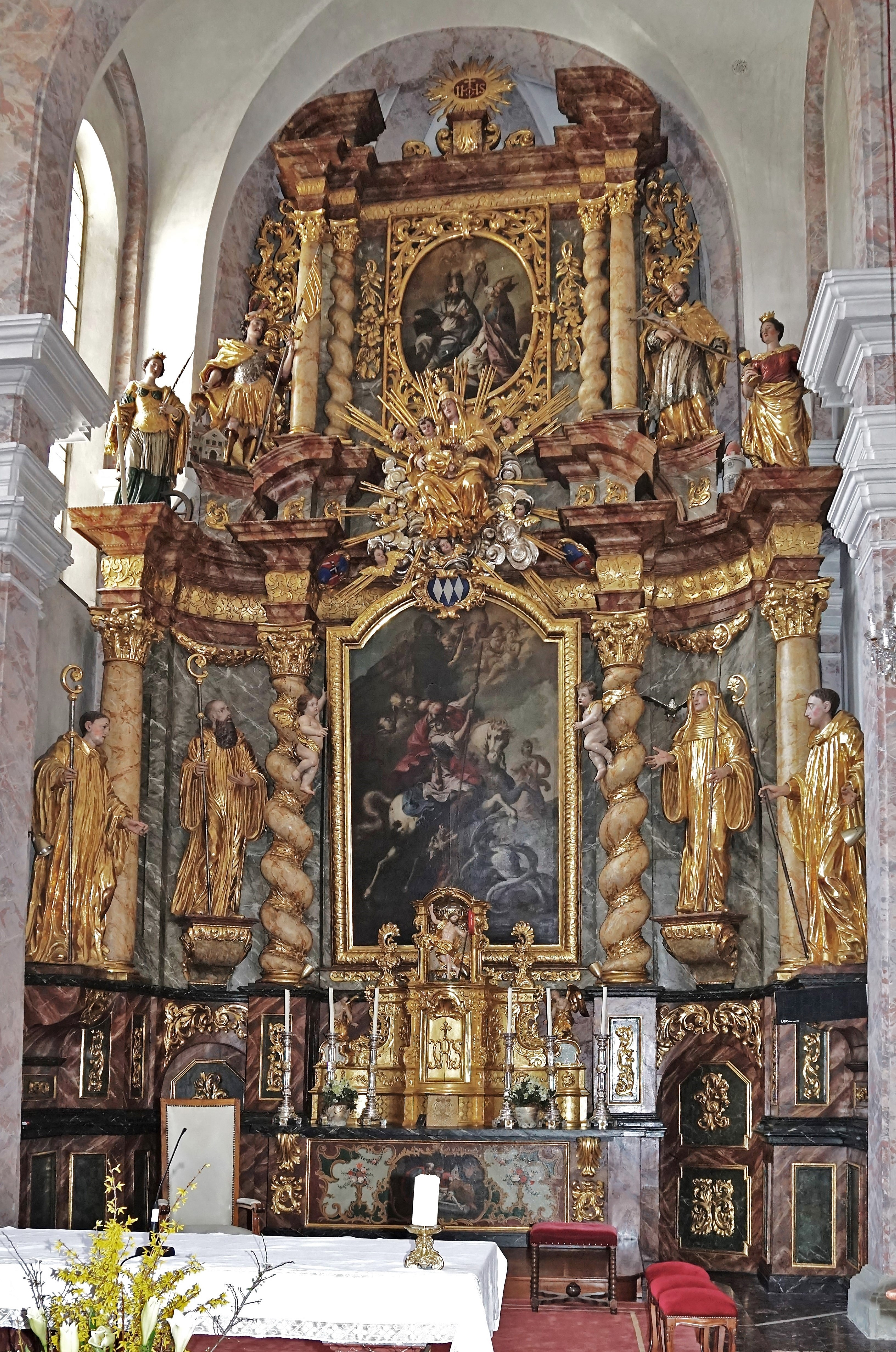 Pfarr- und ehem. Stiftskirche St. Georgen am Längsee, barocker Hochaltar